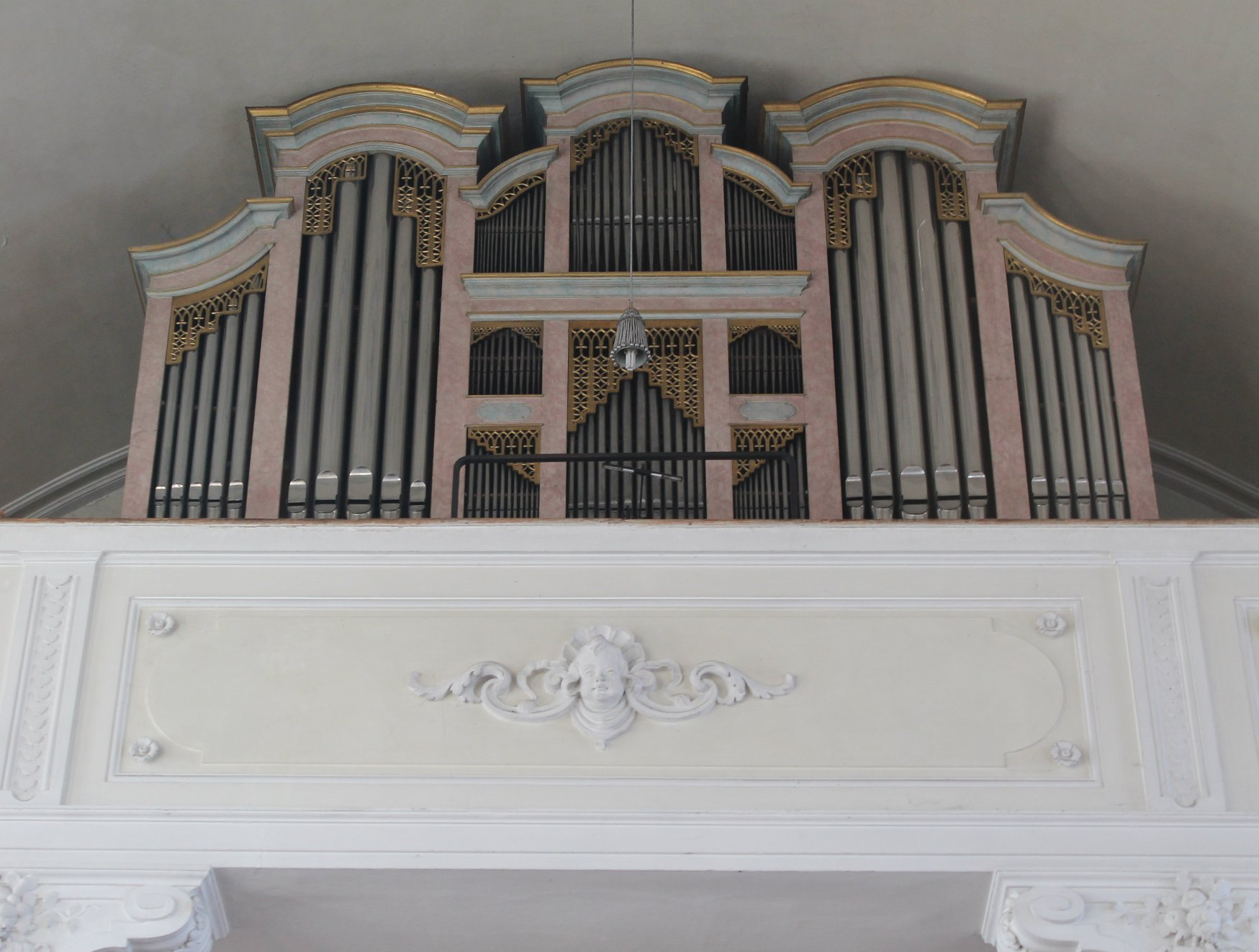 Orgel von St. Laurentius in Pfaffenhofen am Inn (1833, Joseph Pröbstl, II/21)